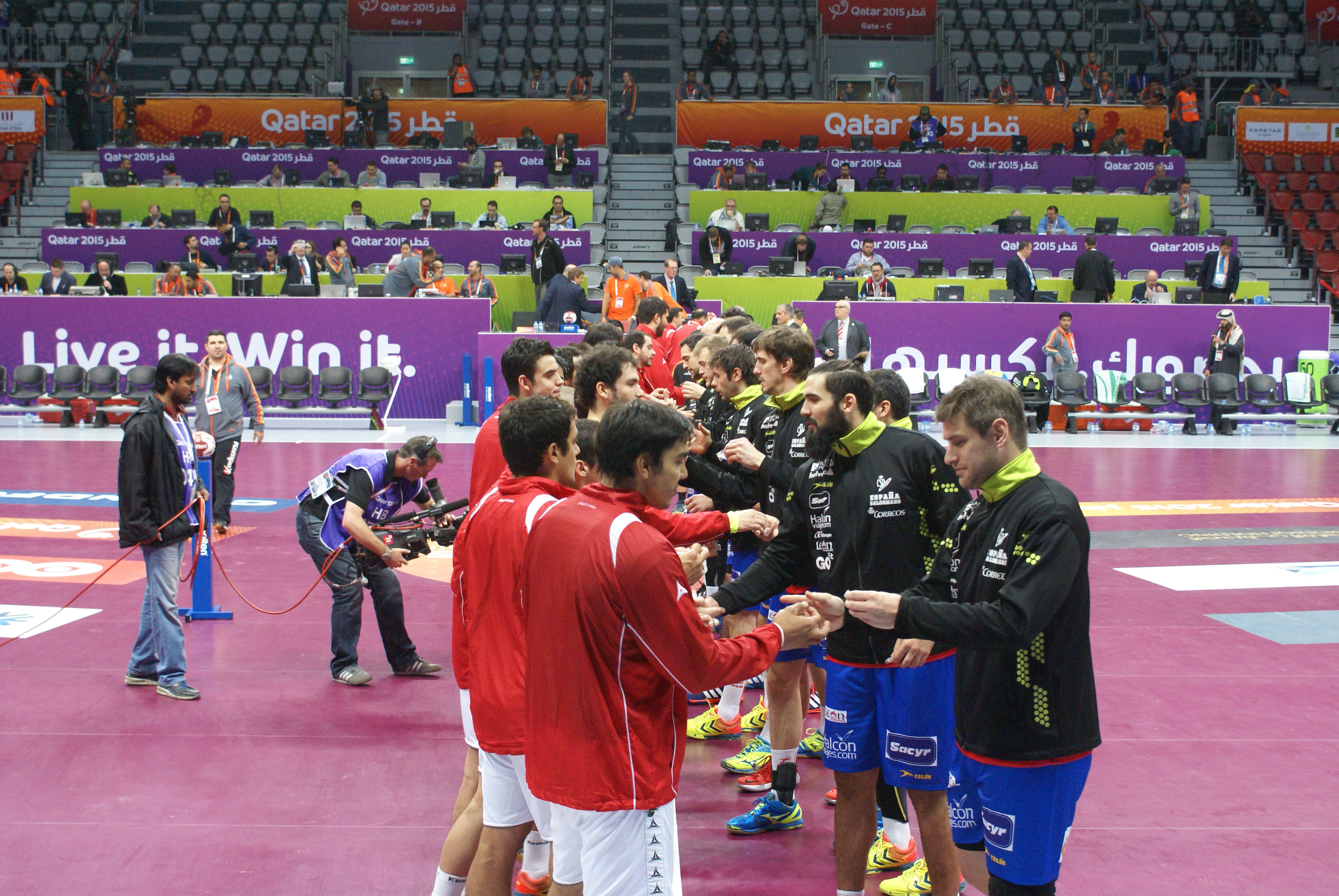 Saludo entre las selecciones antes del partido.